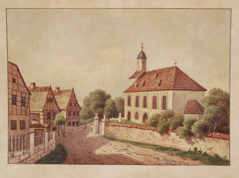 Boritz